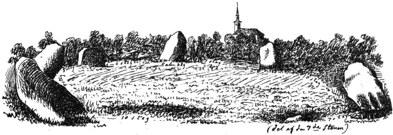 Domarring i Slaka i Östergötland. Teckning i "Utdrag af Antiqvitets-Intendenten P. A. Säves afgifna berättelse för år 1861", publicerad i Antiqvarisk tidskrift för Sverige band 1, 1864. Text: Uti Asdymlingen (nu häradsjorden), nära i sydost om kyrkan, två stensättningar, den ena rundt aflång, bestående af 7 höga klumptenar; af den andra återstå endast 3 stenar. Det är den första som avbildas på denna bild.